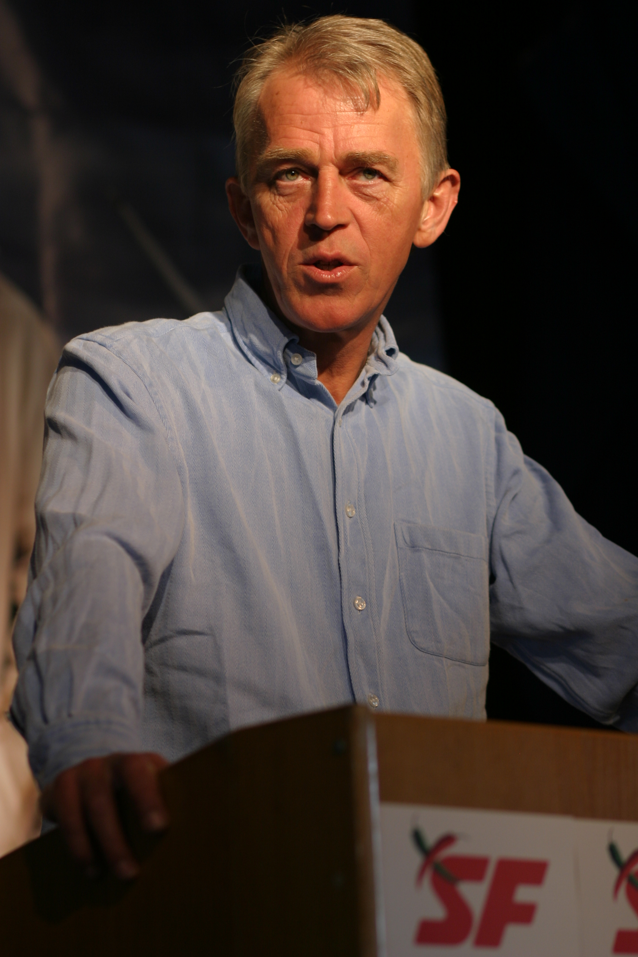 Villy Søvndal taler til 1. maj-arrangement i Hvidovre i 2007.